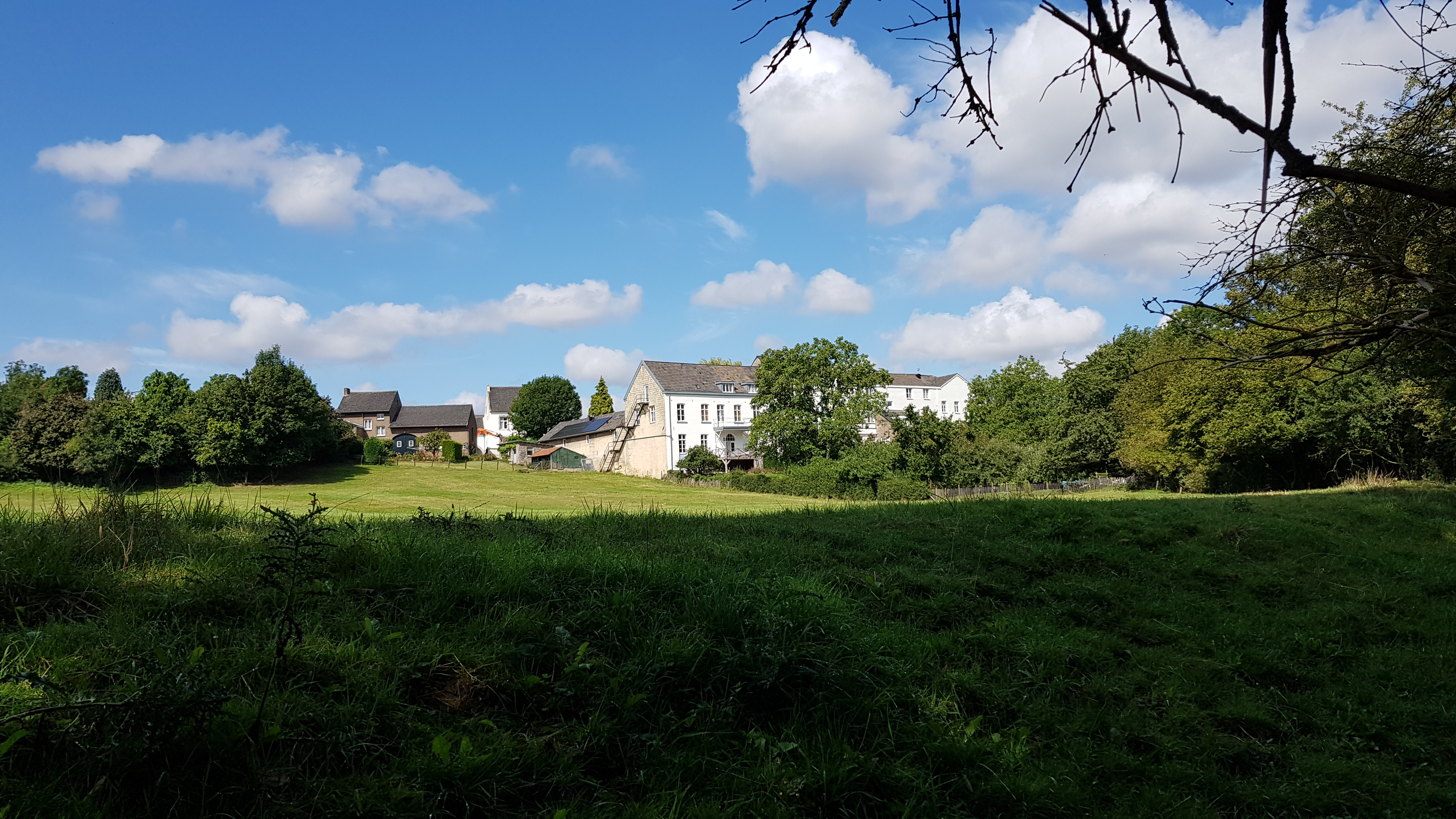 Europahuis, Sint Antoniusbank, Nederland